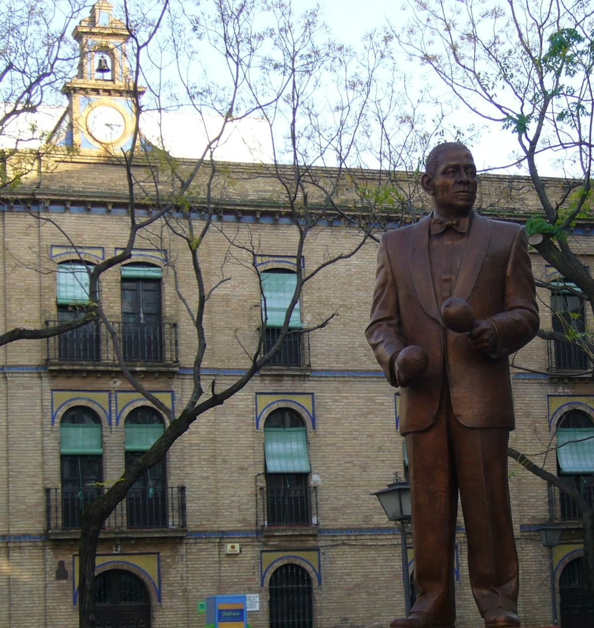 El cantante cubano Antonio Machín, estatua en homenaje en la ciudad de Sevilla (España)